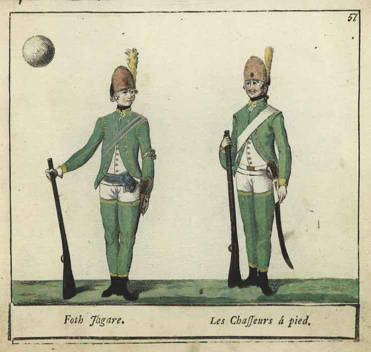 Fotjägarna uniform m/1779, ur C. G. Roos samling.